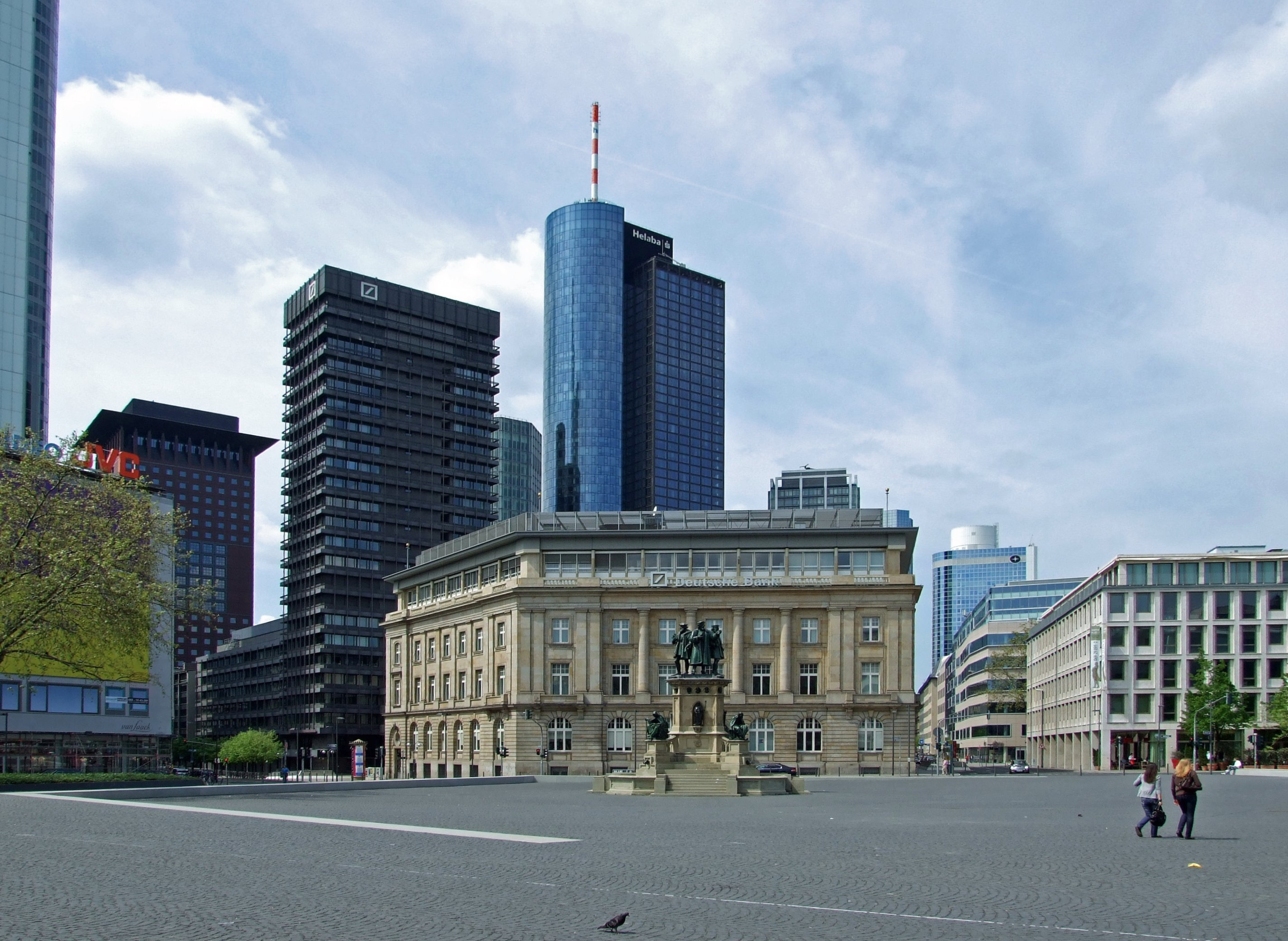 Rossmarkt in Frankfurt/M mit Gutenberg-Denkmal